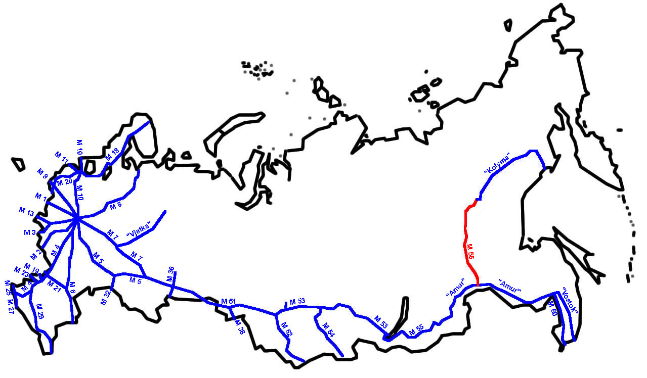 M56 im russischen Fernstraßennetz